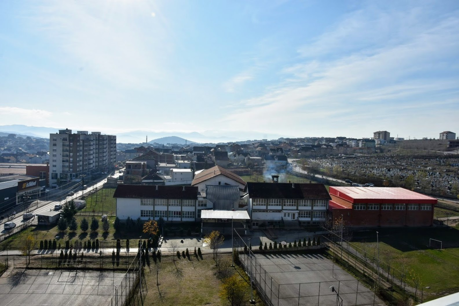 Shkolla "Abaz Ajeti" Gjilan